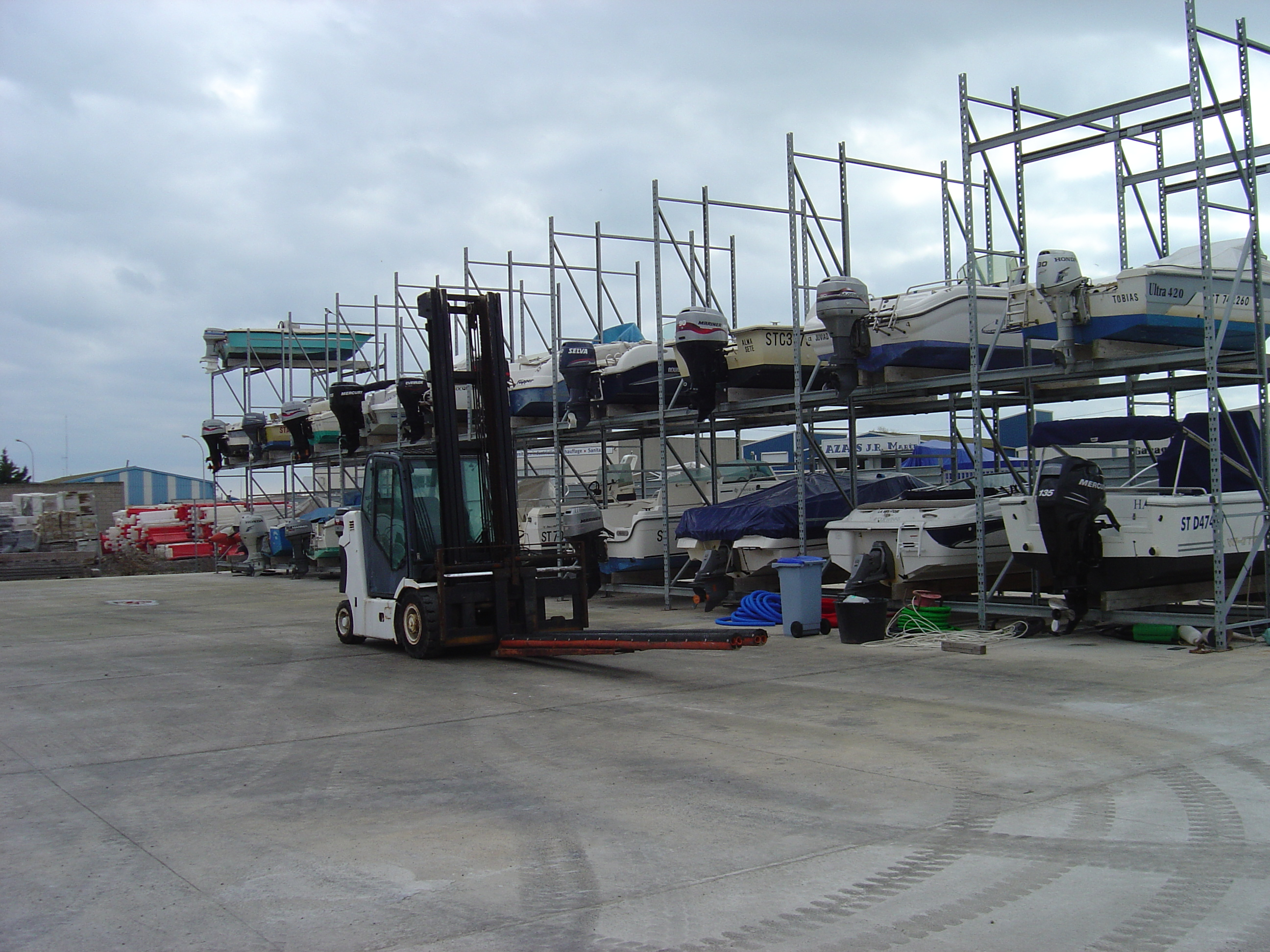 Rack supportant les bateaux avec le chariot élévateur